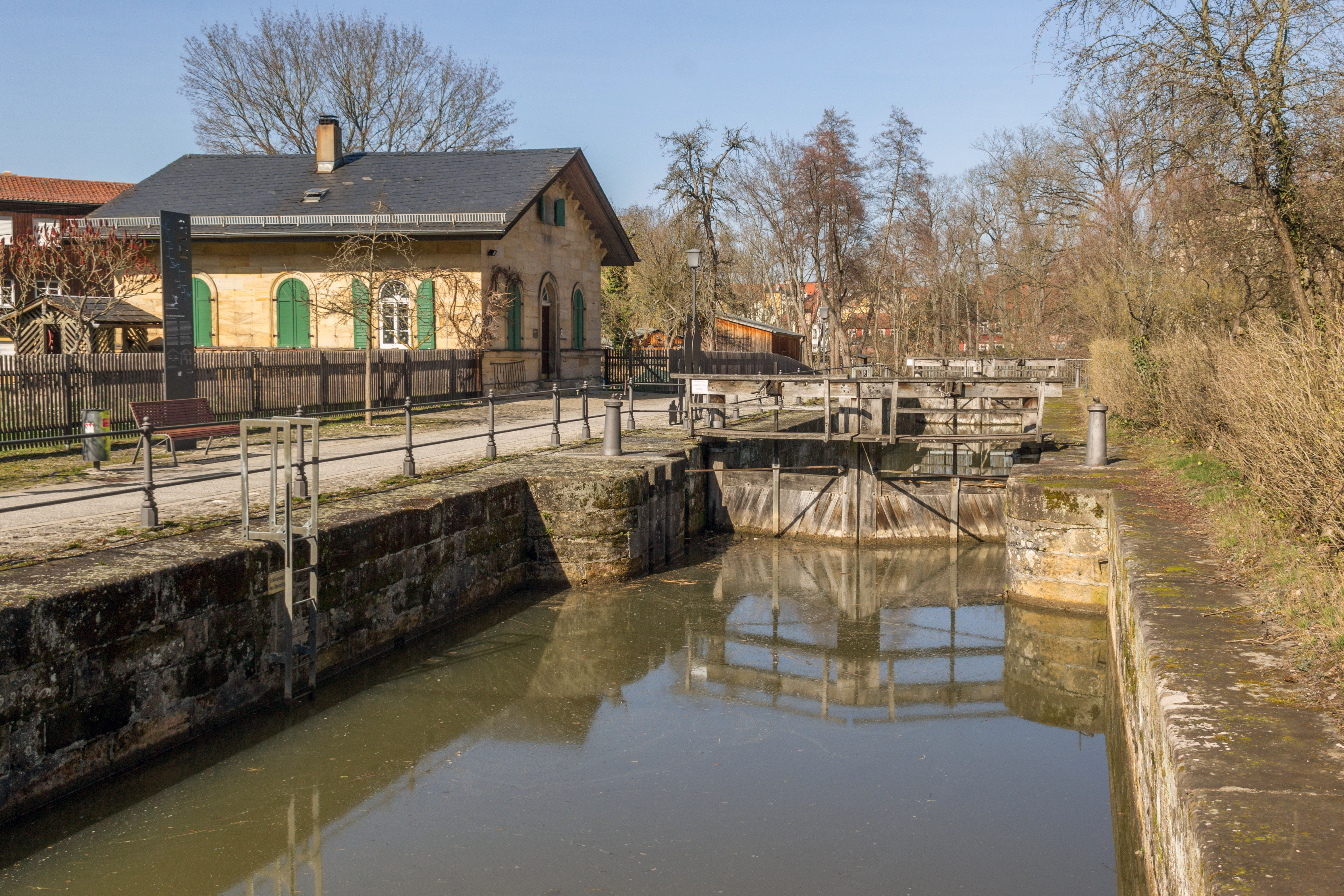 Ludwig-Donau-Main-Kanal, Bamberg, Schleuse 100